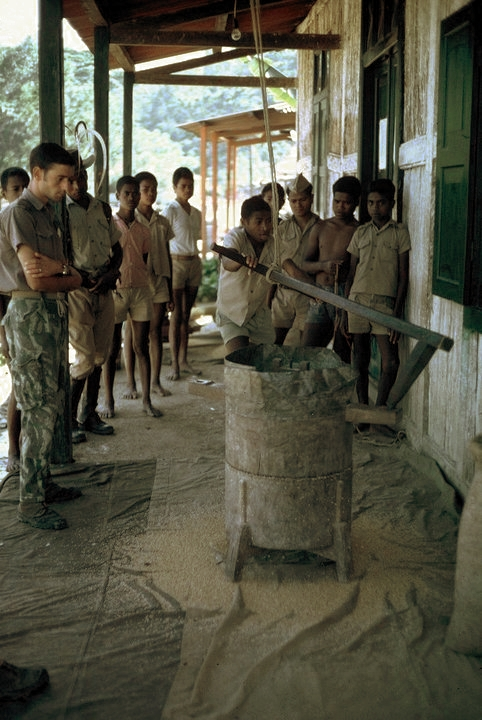 Curioso engenho tradicional timor destinado a descascar o néli(arroz com a casca)